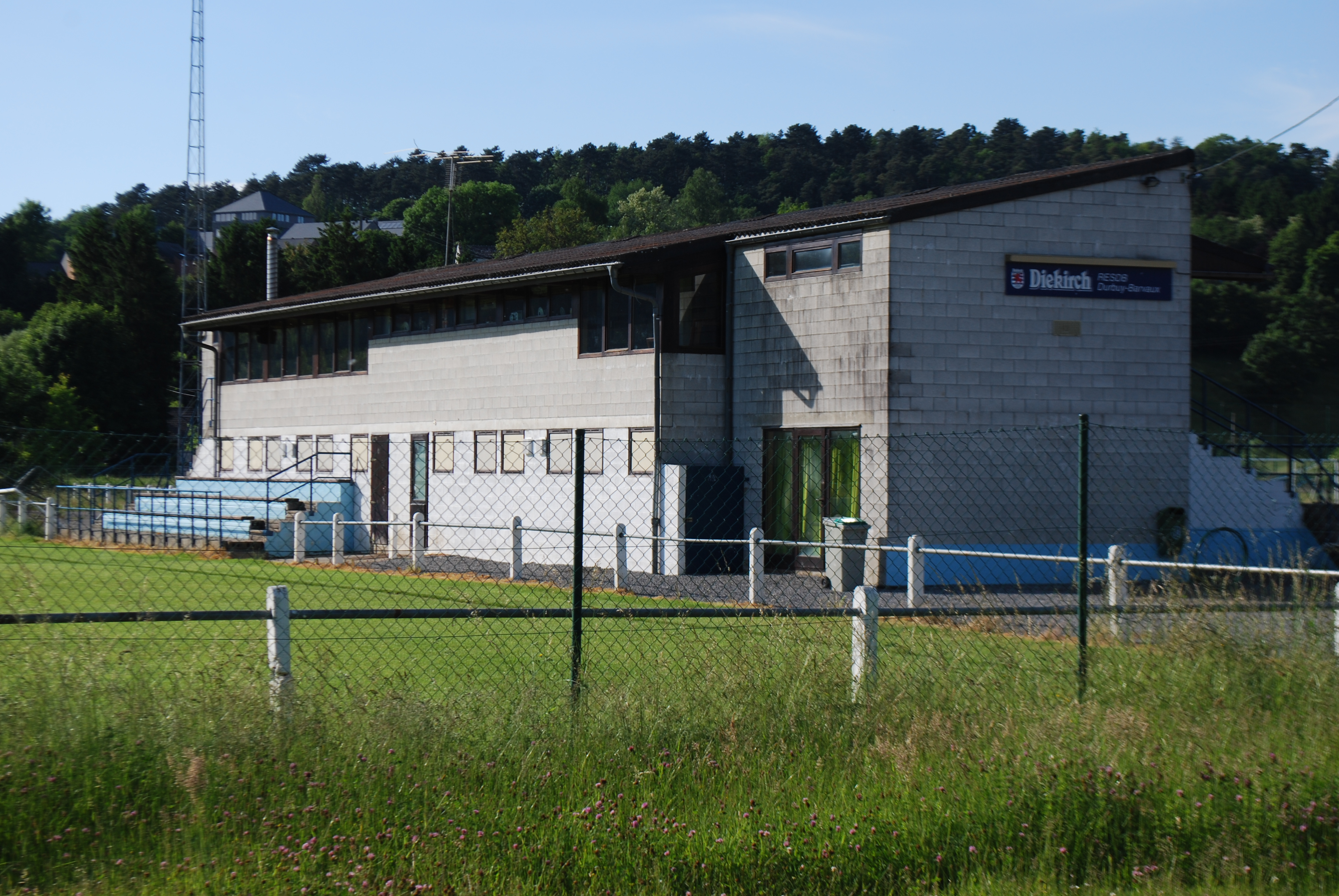 Vue des terrains de la R.E.S. Durbuysienne.